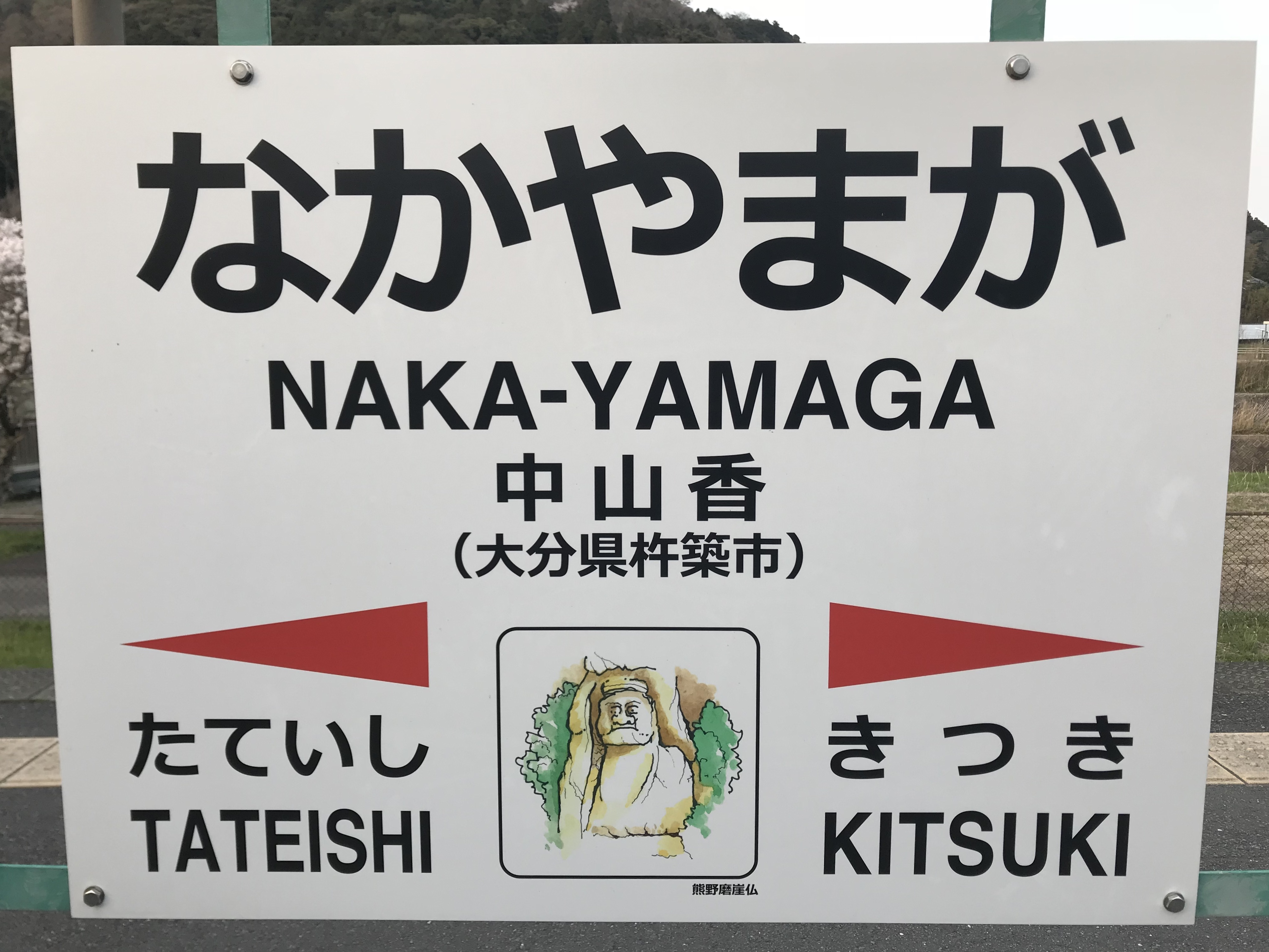 中山香駅の駅名標。イラストは熊野磨崖仏